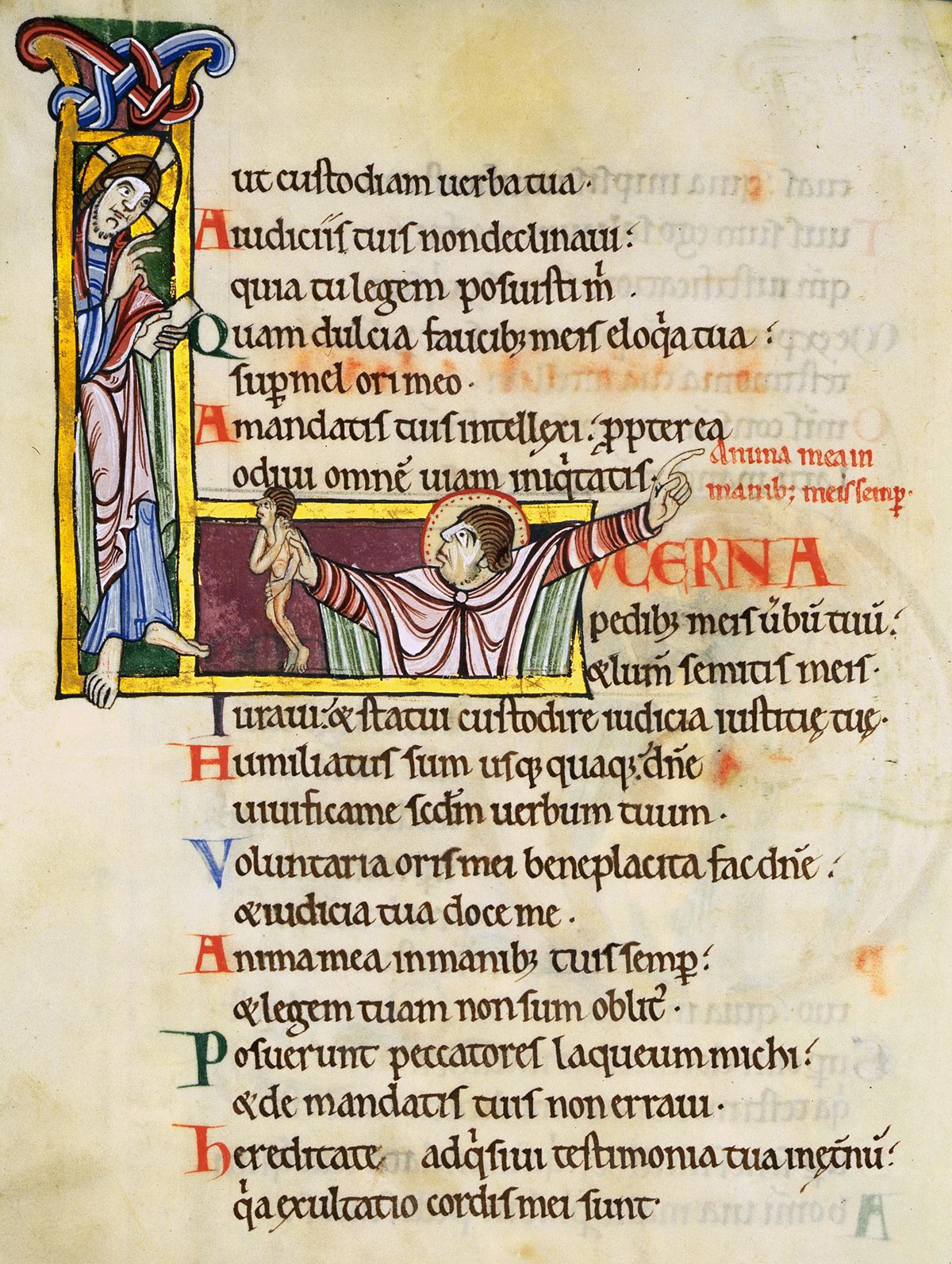 Initial L aus Psalm 118 (119), Vers 109. In: Albani-Psalter